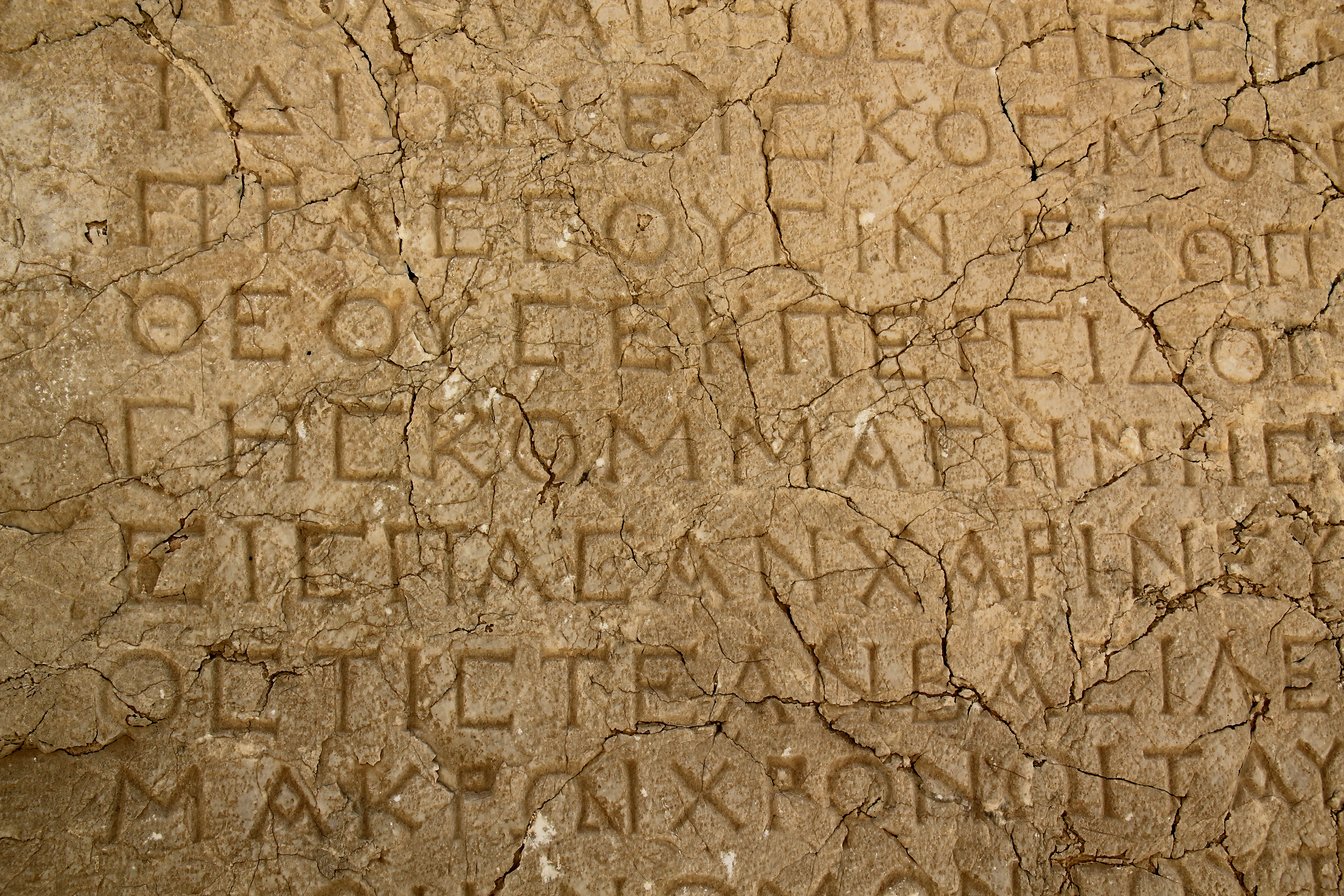 Ausschnitt der Nomos-Inschrift auf der Rückseite der Monumentalstatuen, Nemrut Dağı, Südosttürkei, Westterrasse